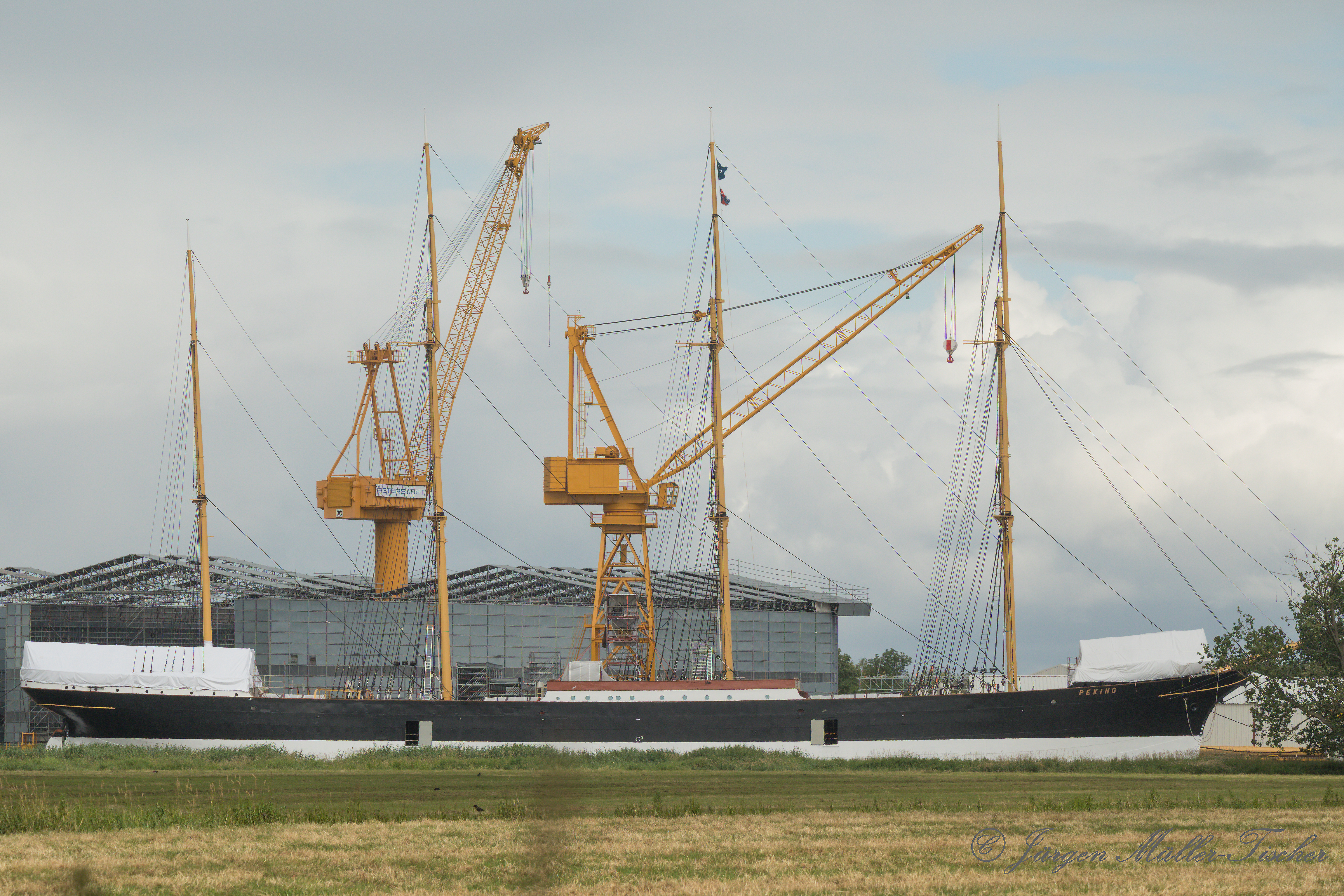 Die Peking ist eine Viermast-Stahlbark und gehörte zu den berühmten Flying P-Linern der Reederei F. Laeisz.